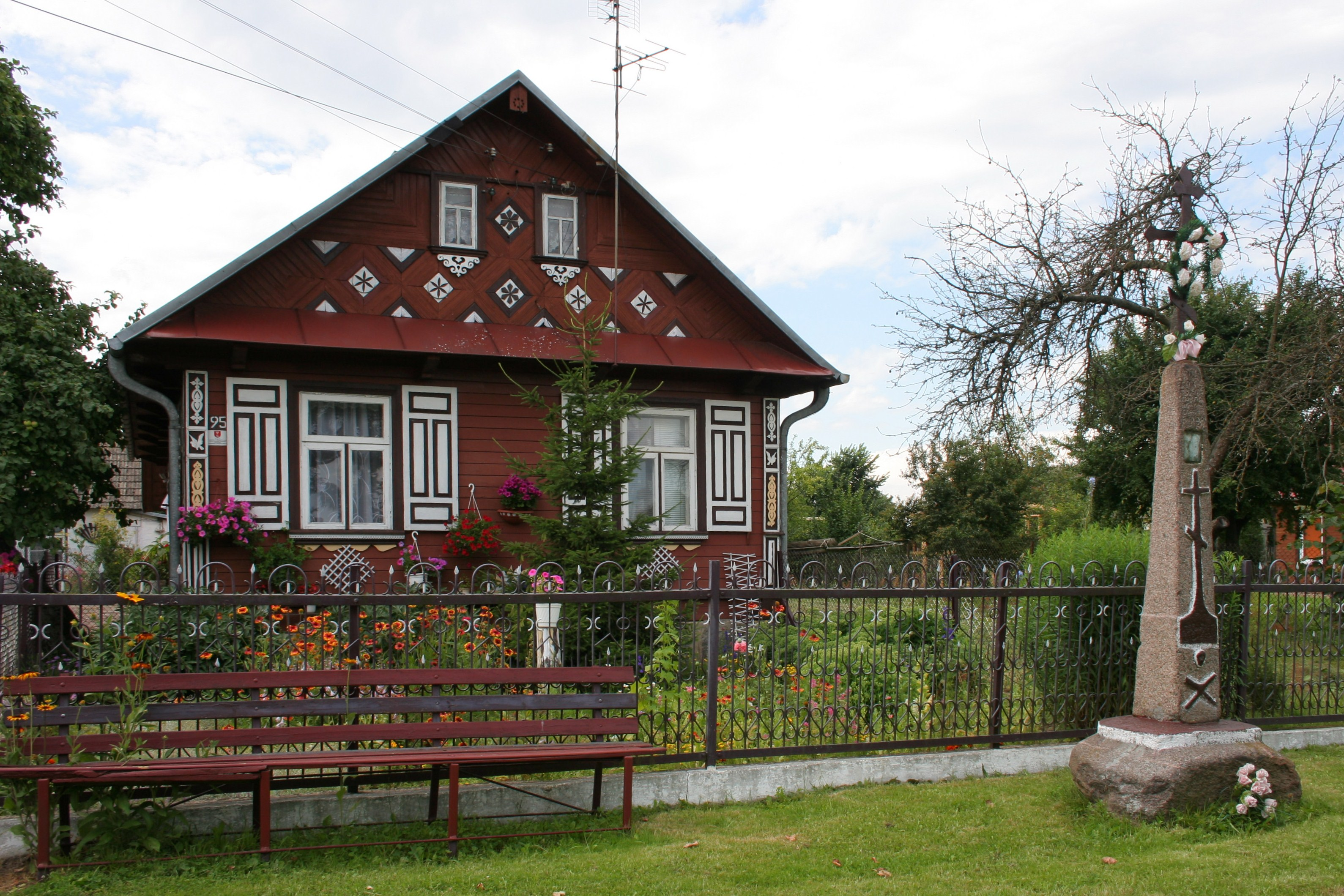 Dom mieszkalny w Czyżach.